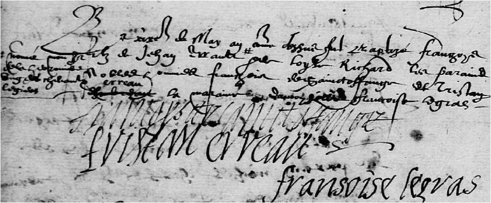 copie d'acte détat civil